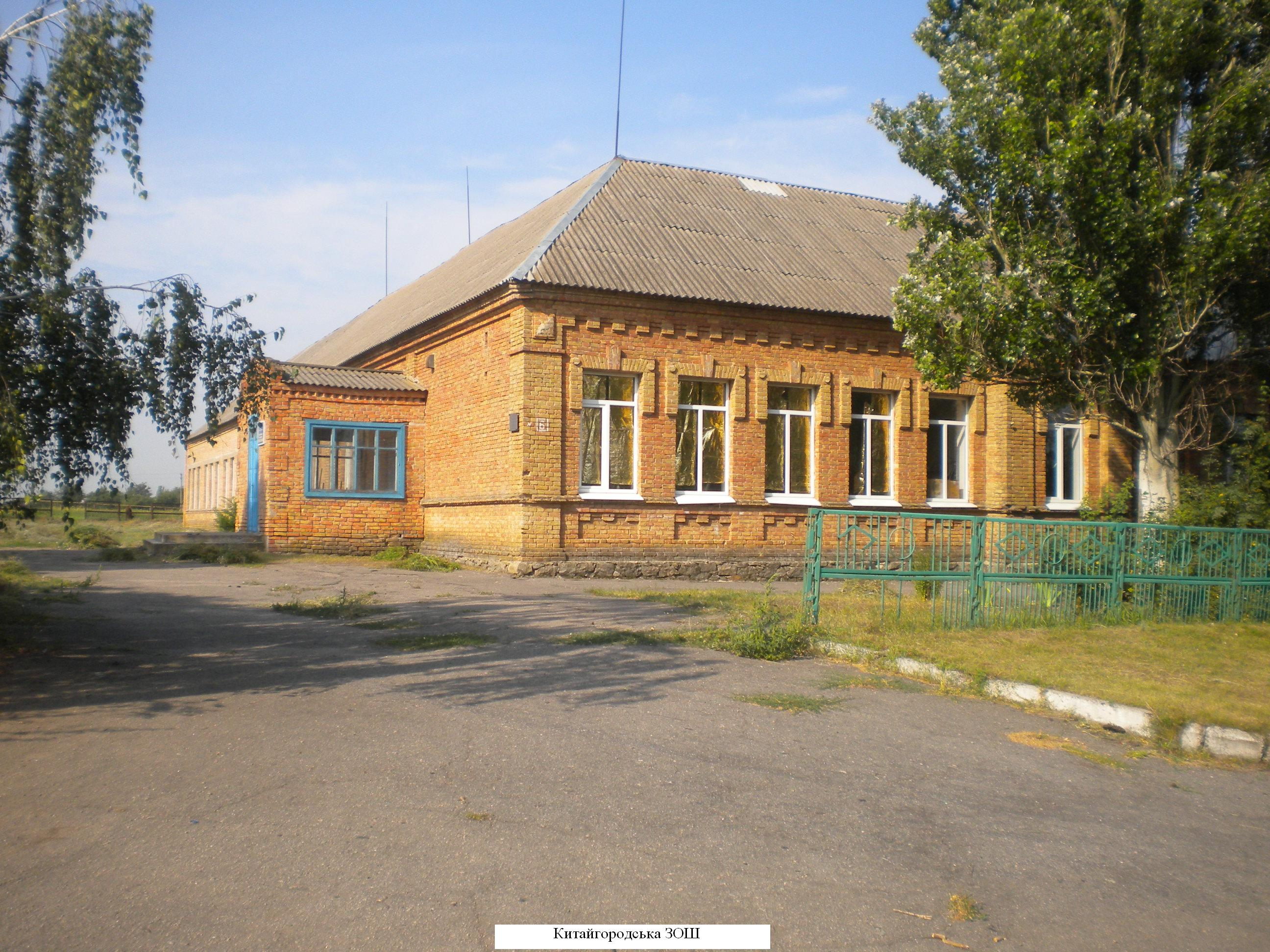 Китайгородская средняя школа